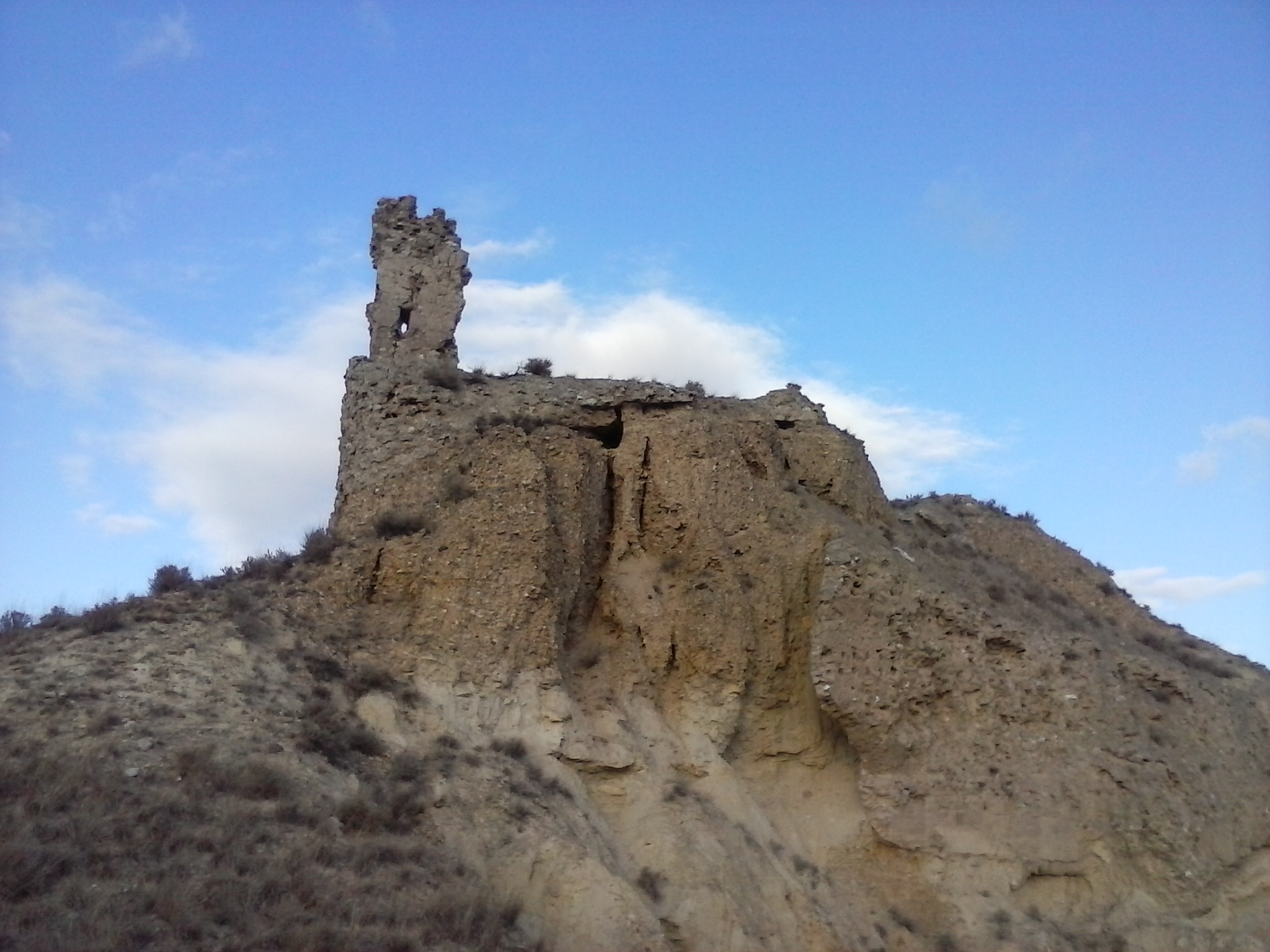 Castillo de Juslibol (Zaragoza), también llamado "El Picote de San Martín". Esta es la vista desde el sur, desde el lado del núcleo urbano